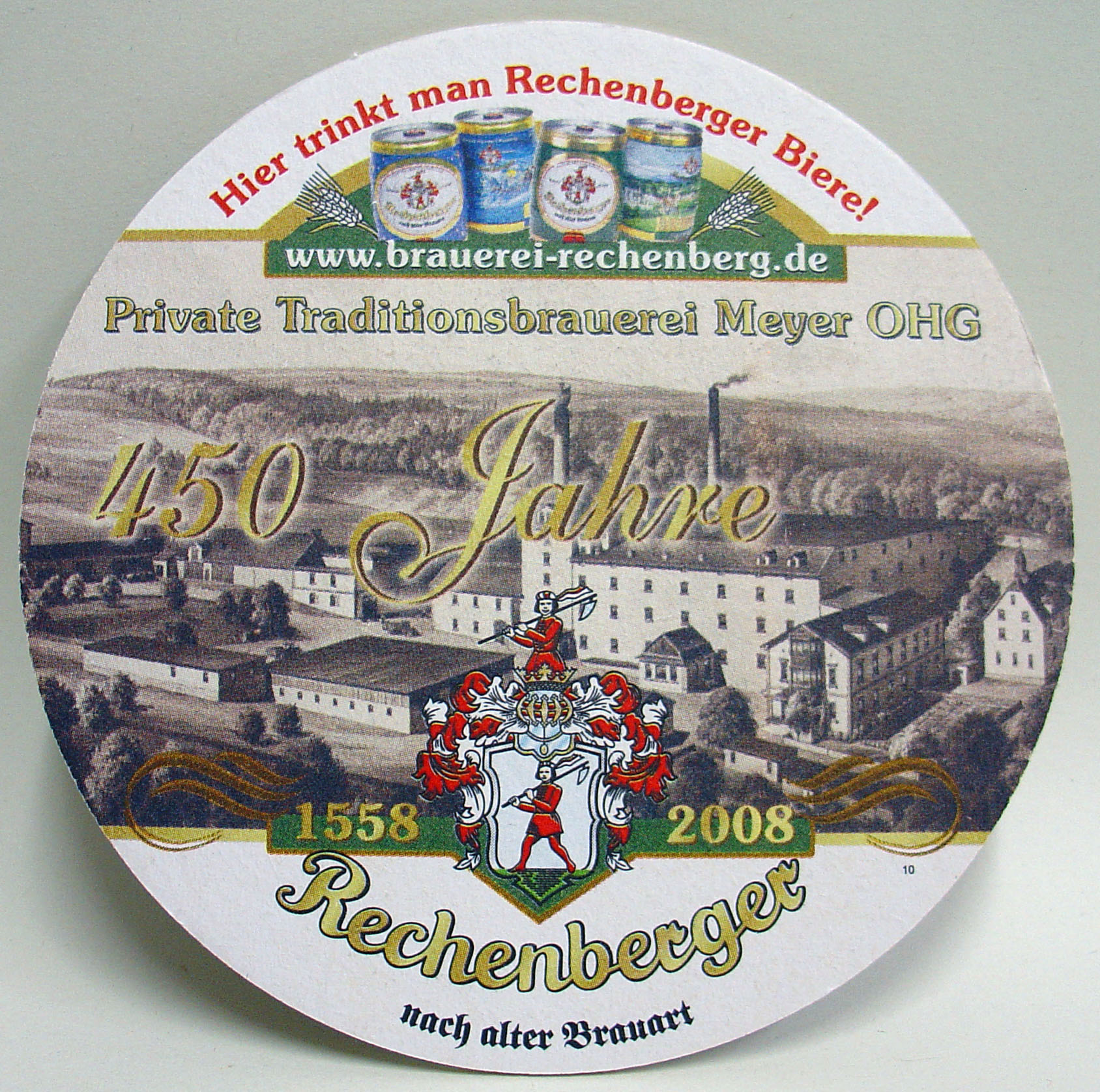 Rechenberger Bierdeckel 450 Jahre, 1558-2008